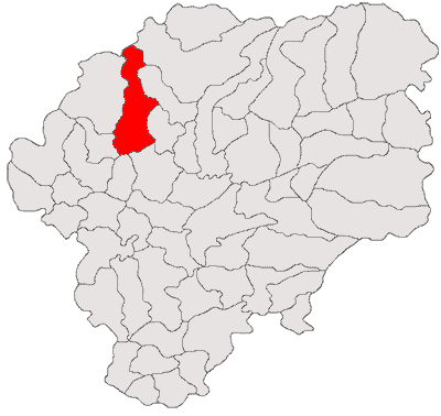 Categorie:Hărţi ale judeţului Bistriţa-Năsăud